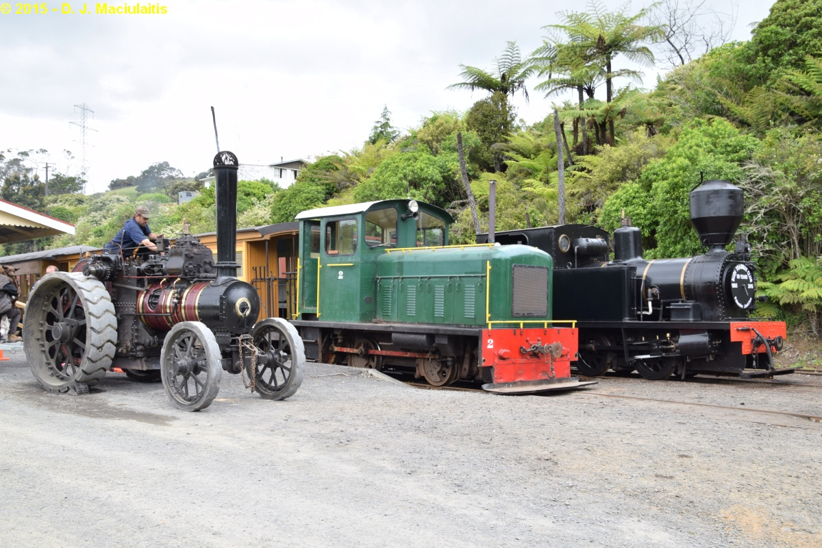 CSC_0201